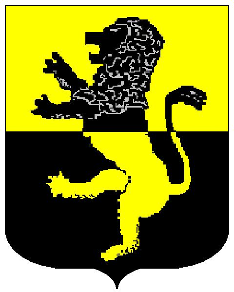 Grb obitelji Fanfonja